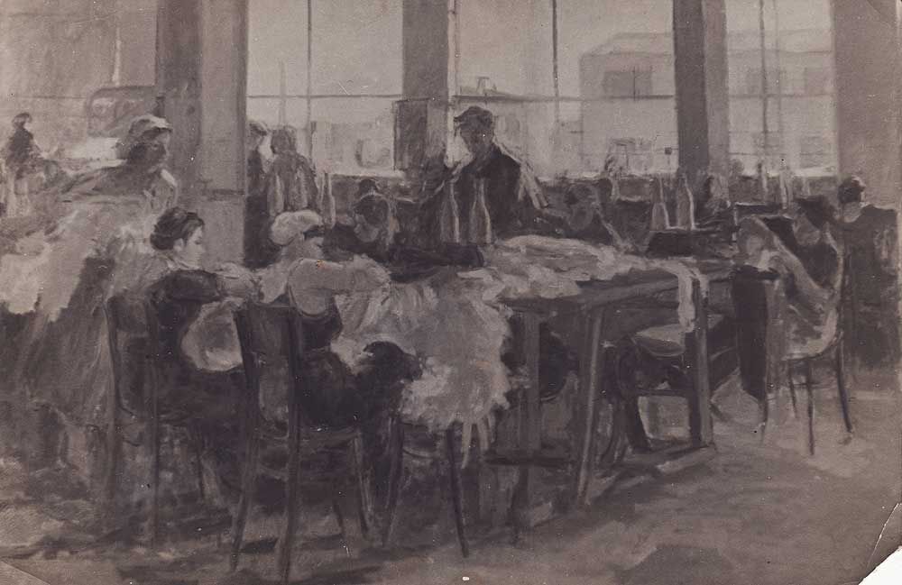 Минская текстильная фабрика, 1940 Холст, масло Местонахождение неизвестно